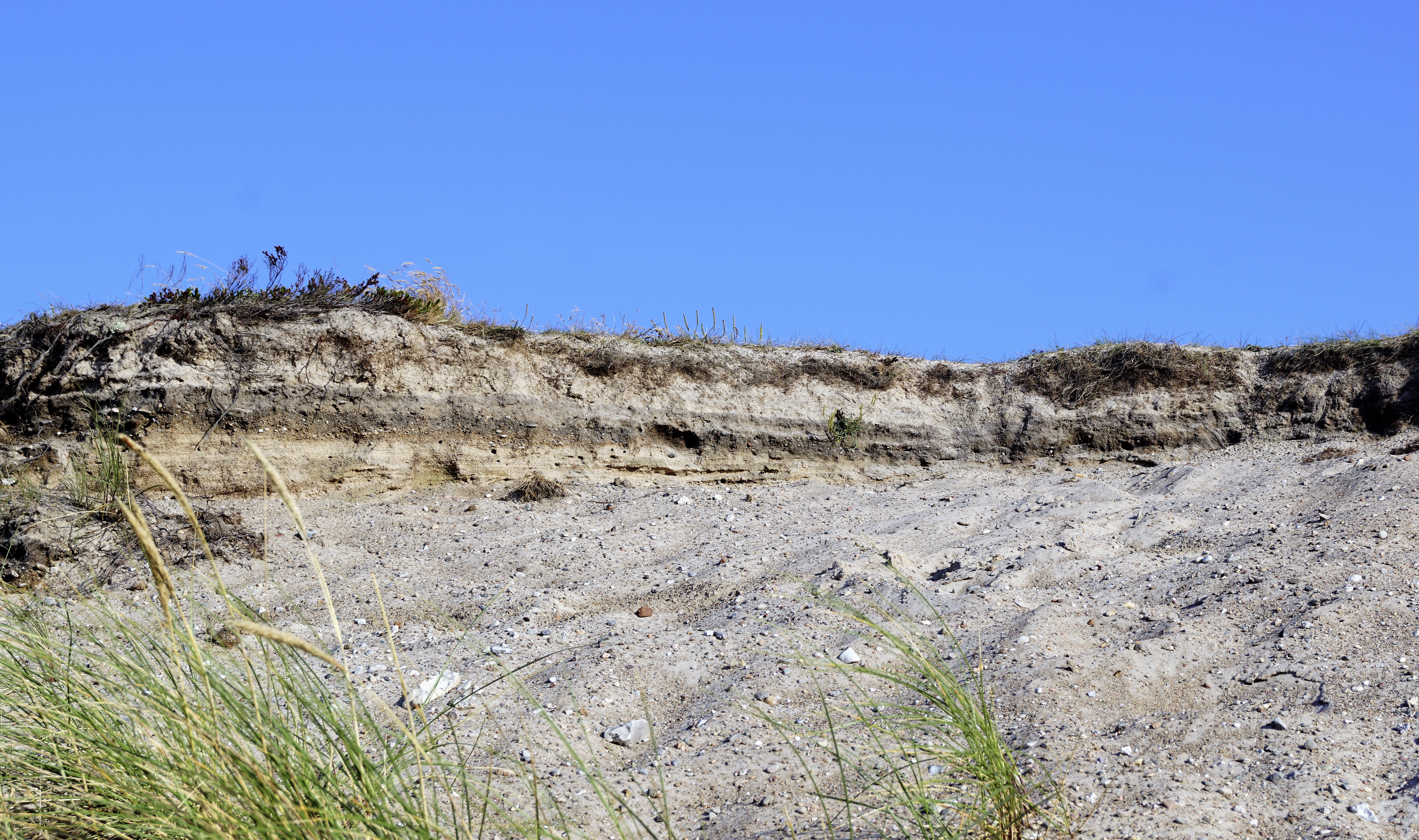 Lagdannelser i klinten ved Nordmarken på Læsø